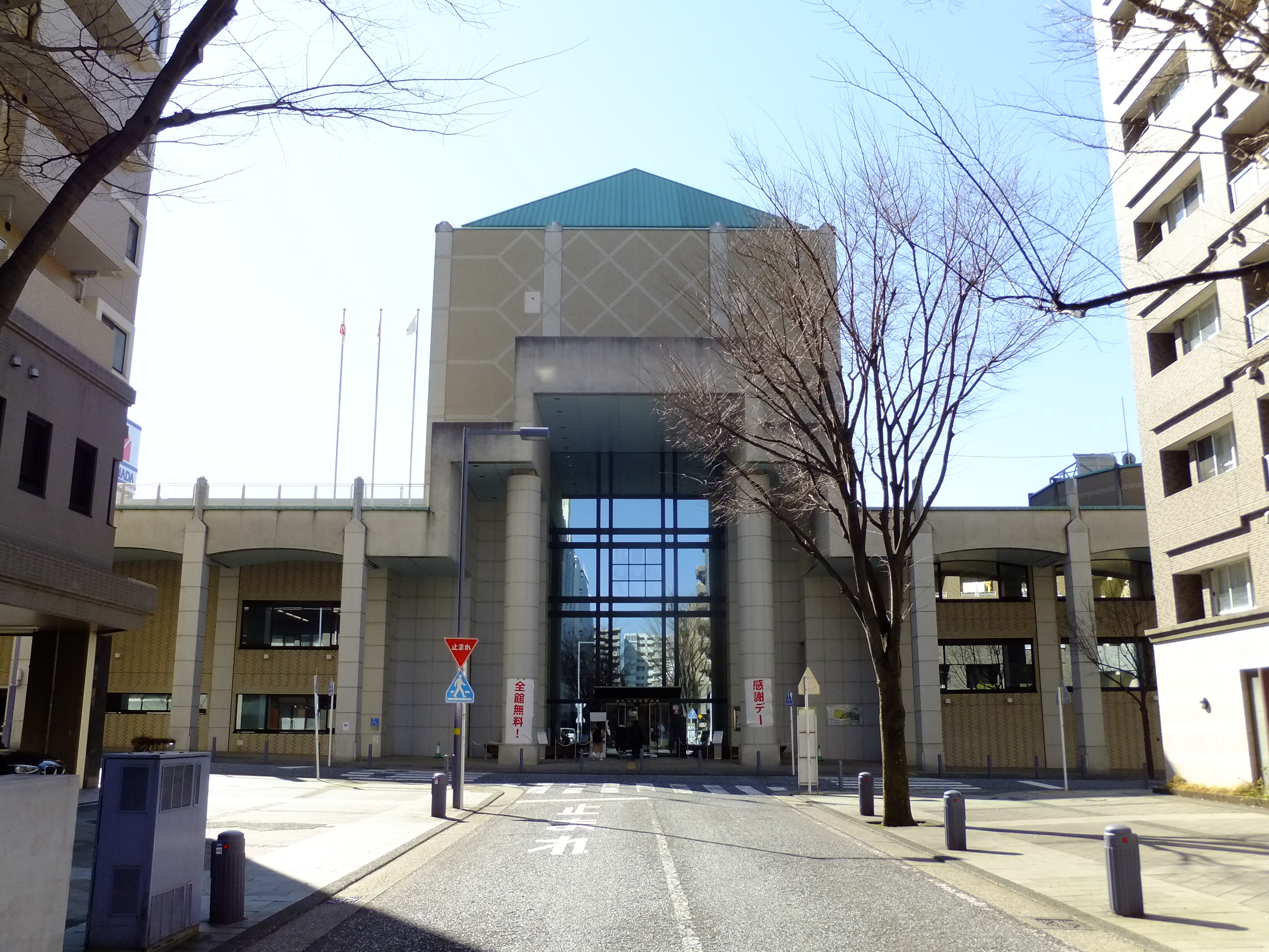 横浜市歴史博物館、建物正面